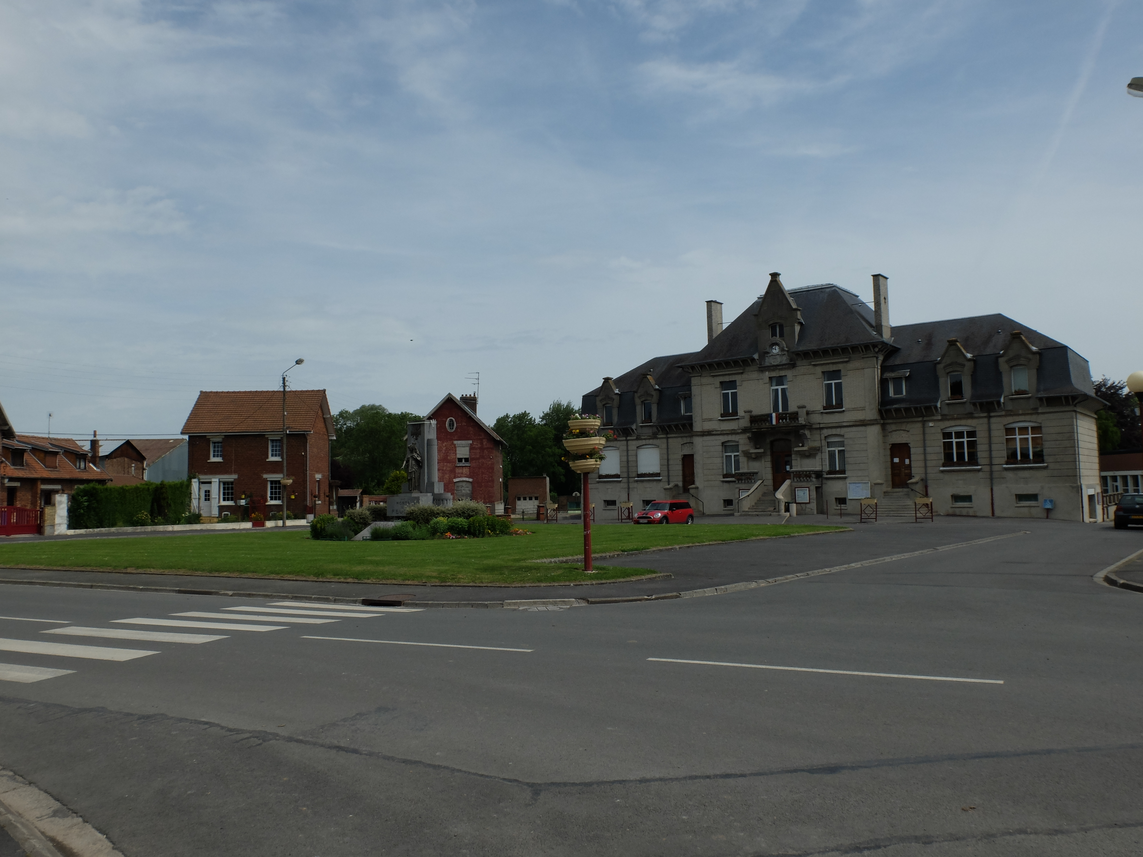 Vue de la place de la mairie de Feuchy.